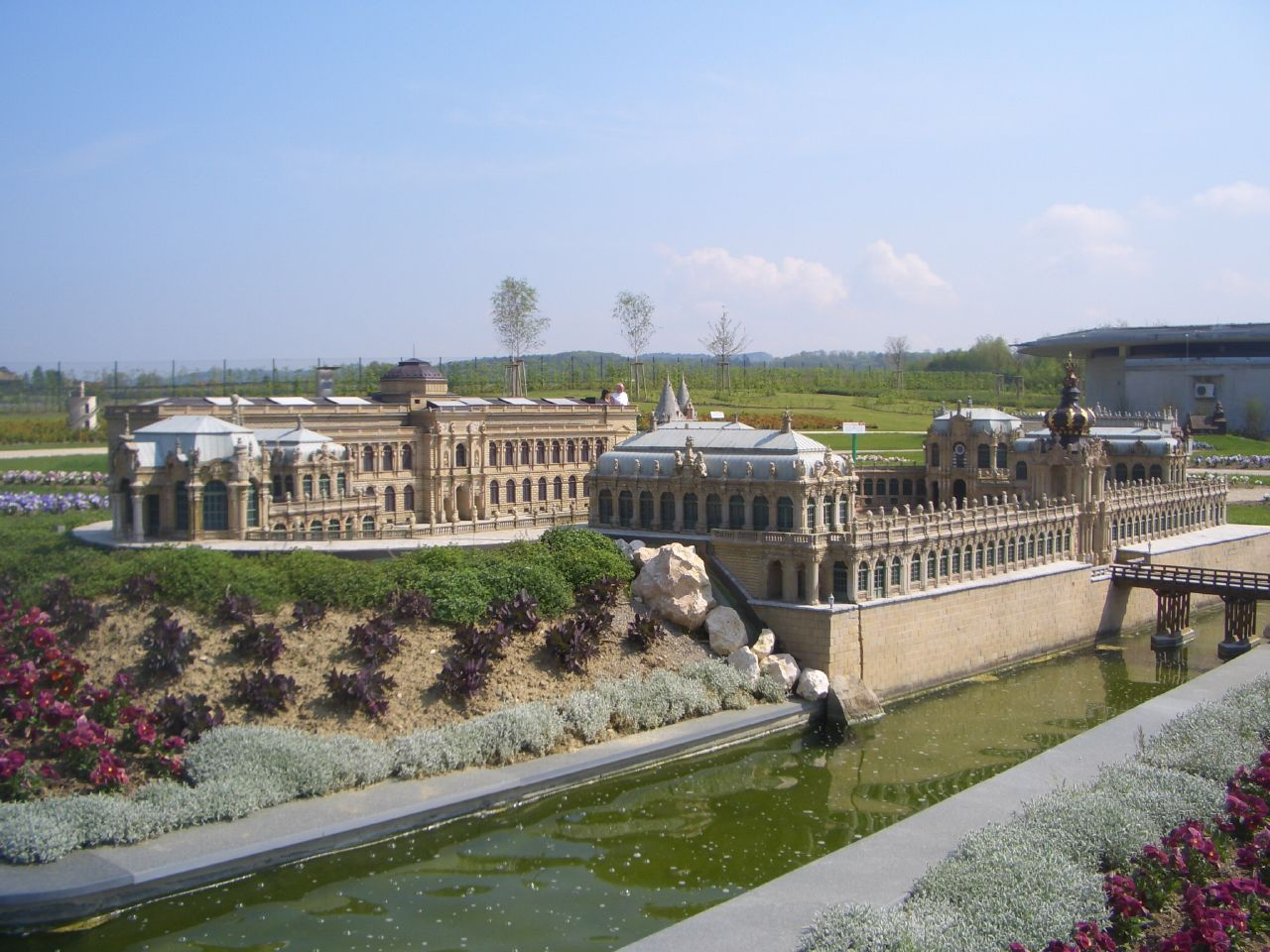 Meckenbeuren, Minimundus Bodensee, Nachbildung des Zwingers in Dresden